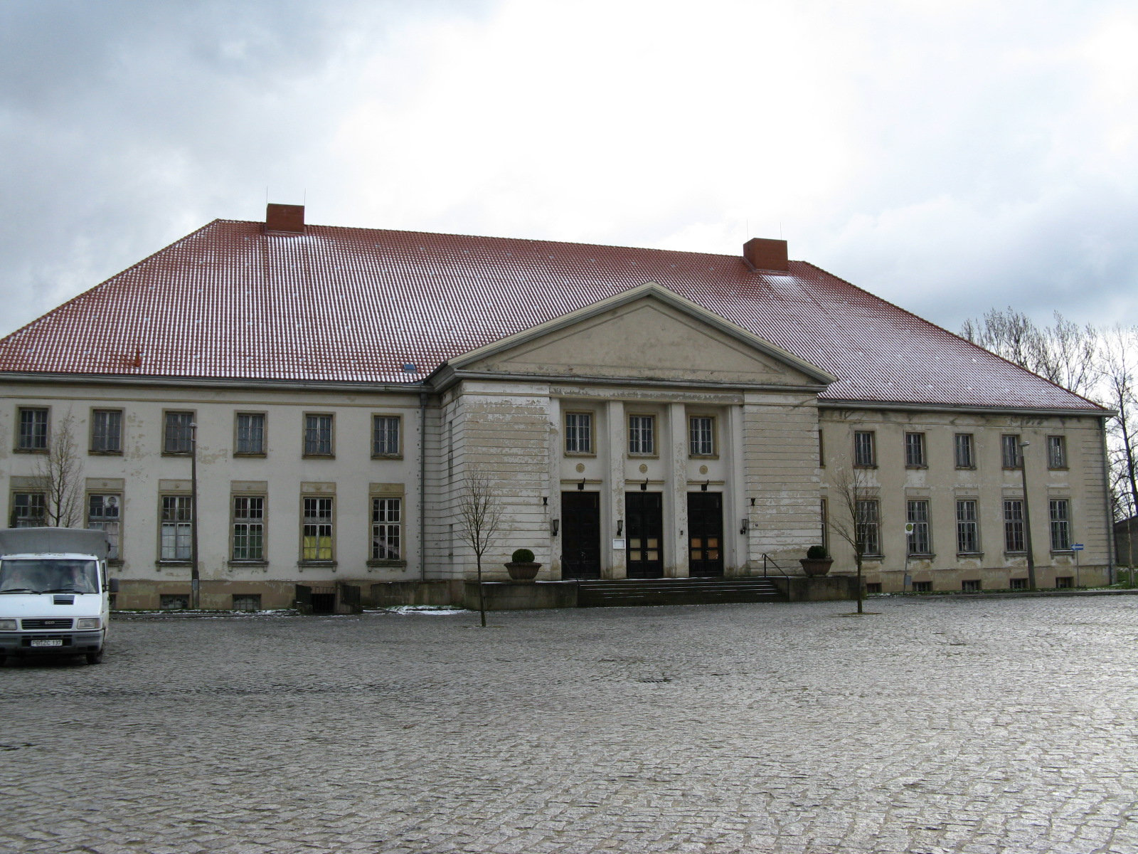 Kulturhaus in Mestlin, Landkreis Parchim, Mecklenburg-Vorpommern